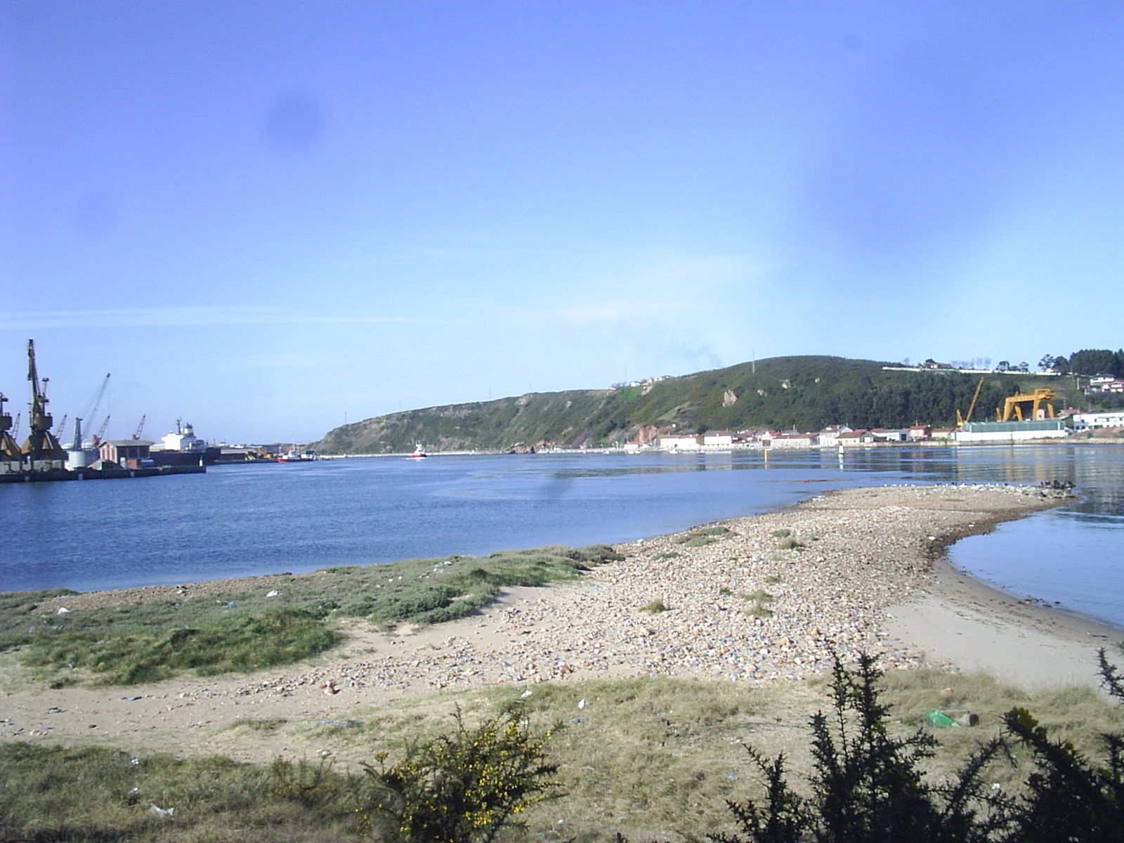 Ensenada de Llodero en la Ría de Avilés, de gran valor ornitológico